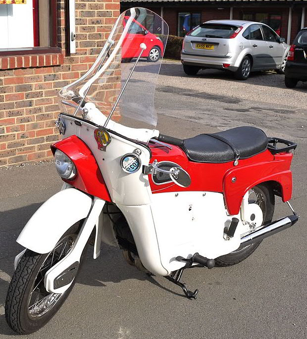 Panasonic G1 14-45 Lens